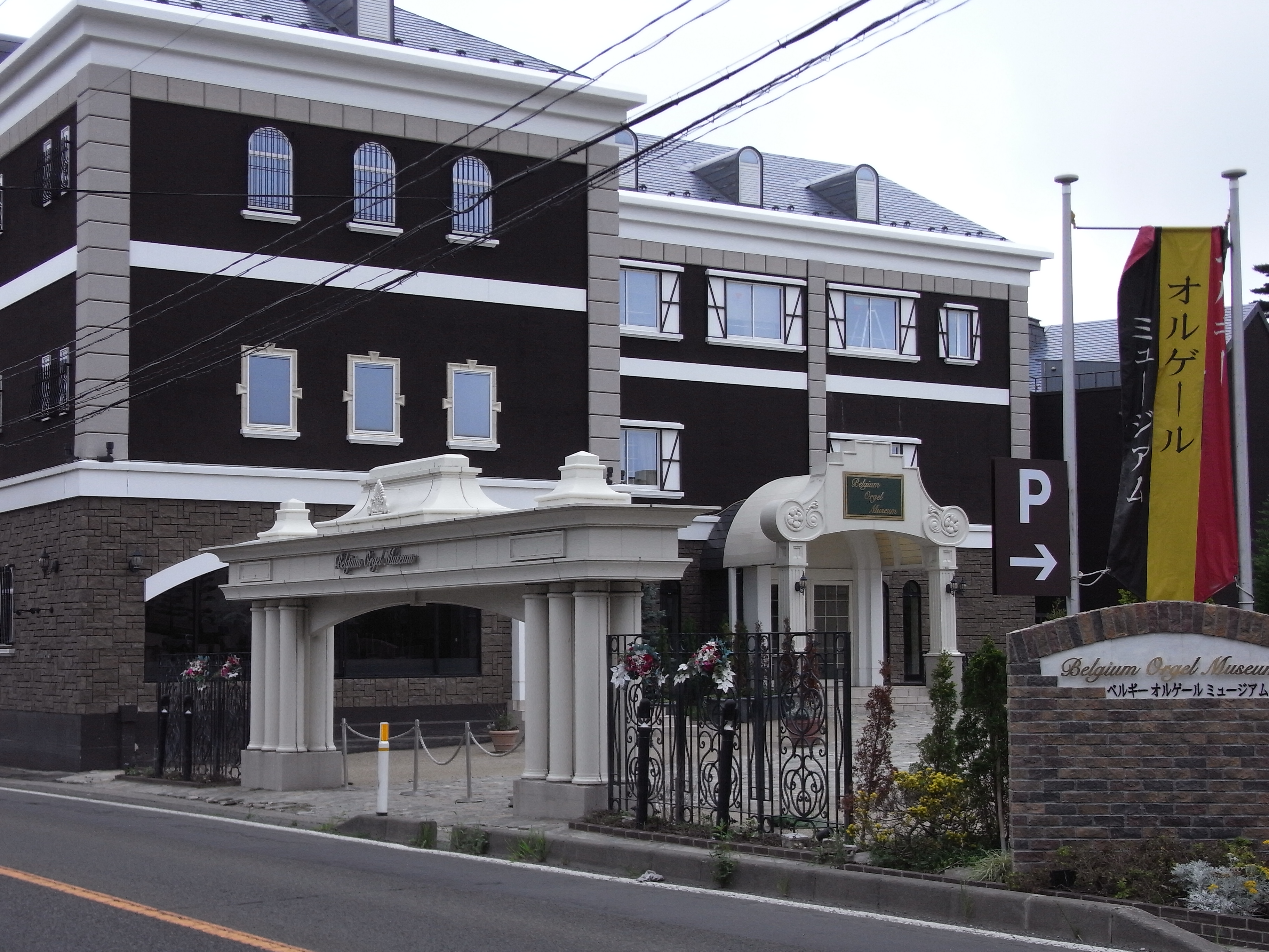 ベルギー・オルゲール・ミュージアム跡地。宮城県松島町。2011年7月7日現地にて撮影。